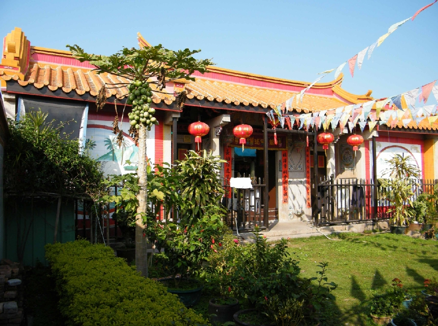 赤港陈氏祖祠之一 安埕巷